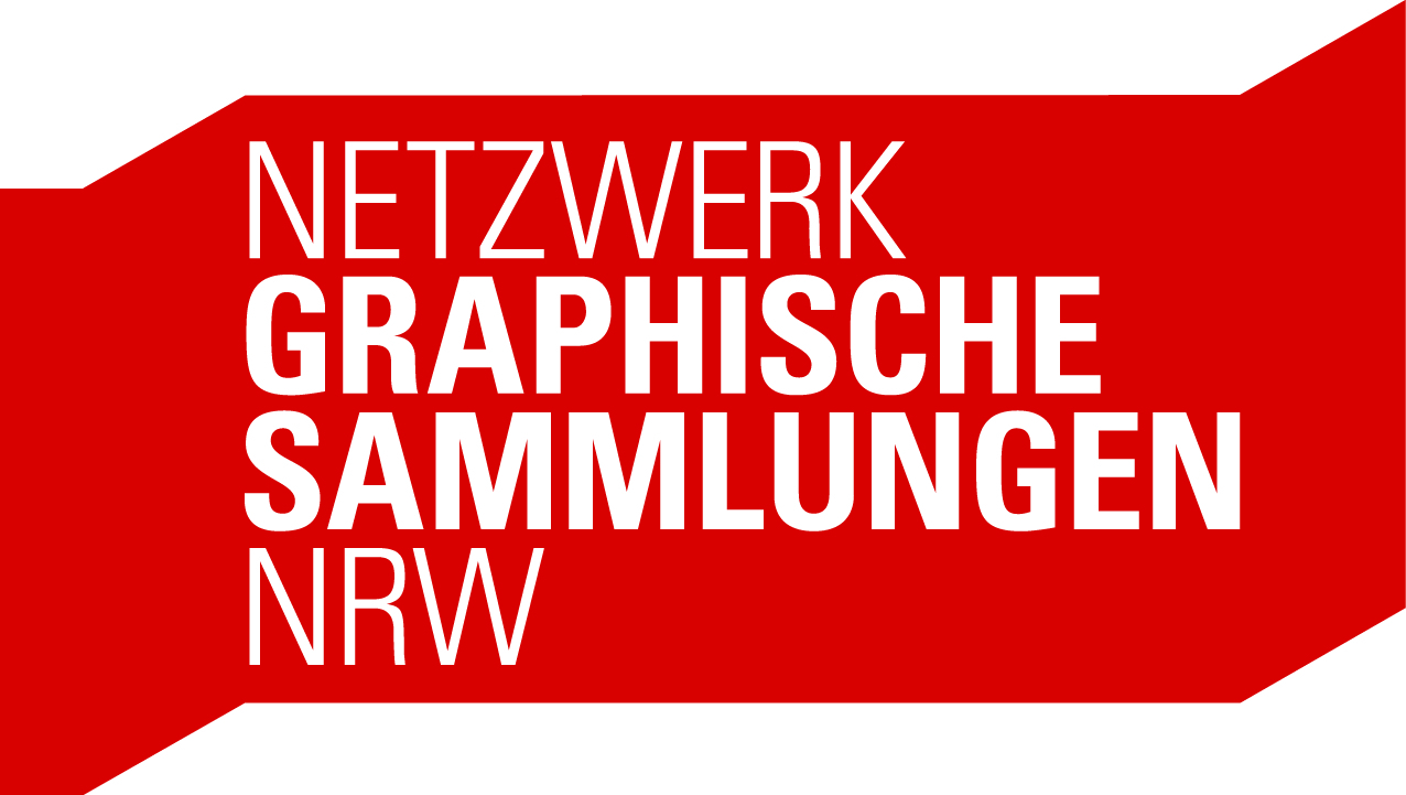 Logo Netzwerk Graphische Sammlungen NRW